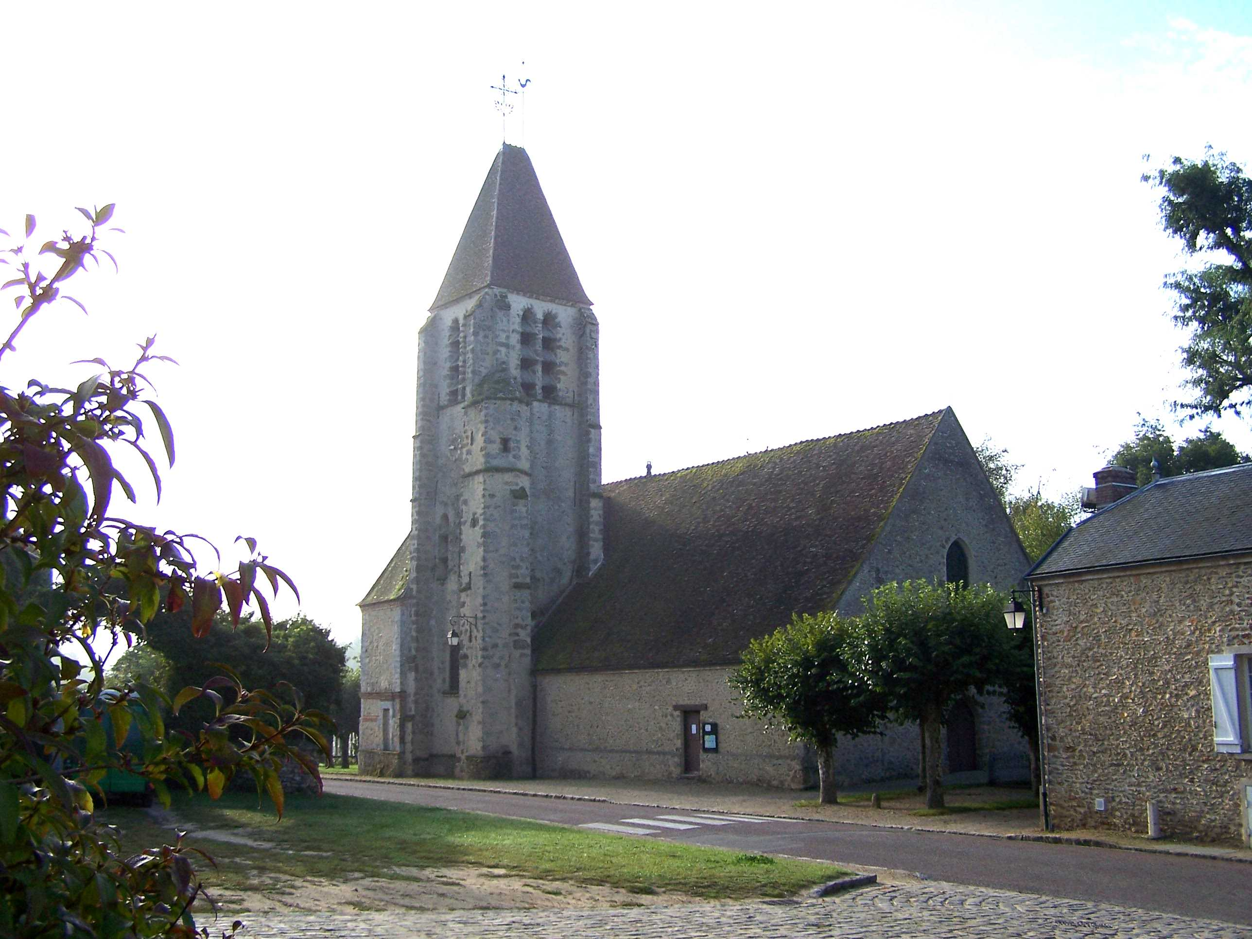 Église de La-Celle-les-Bordes (Yvelines, France)